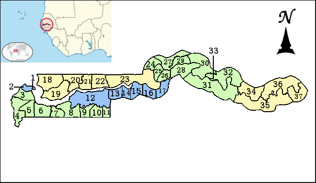 冈比亚县级行政区划